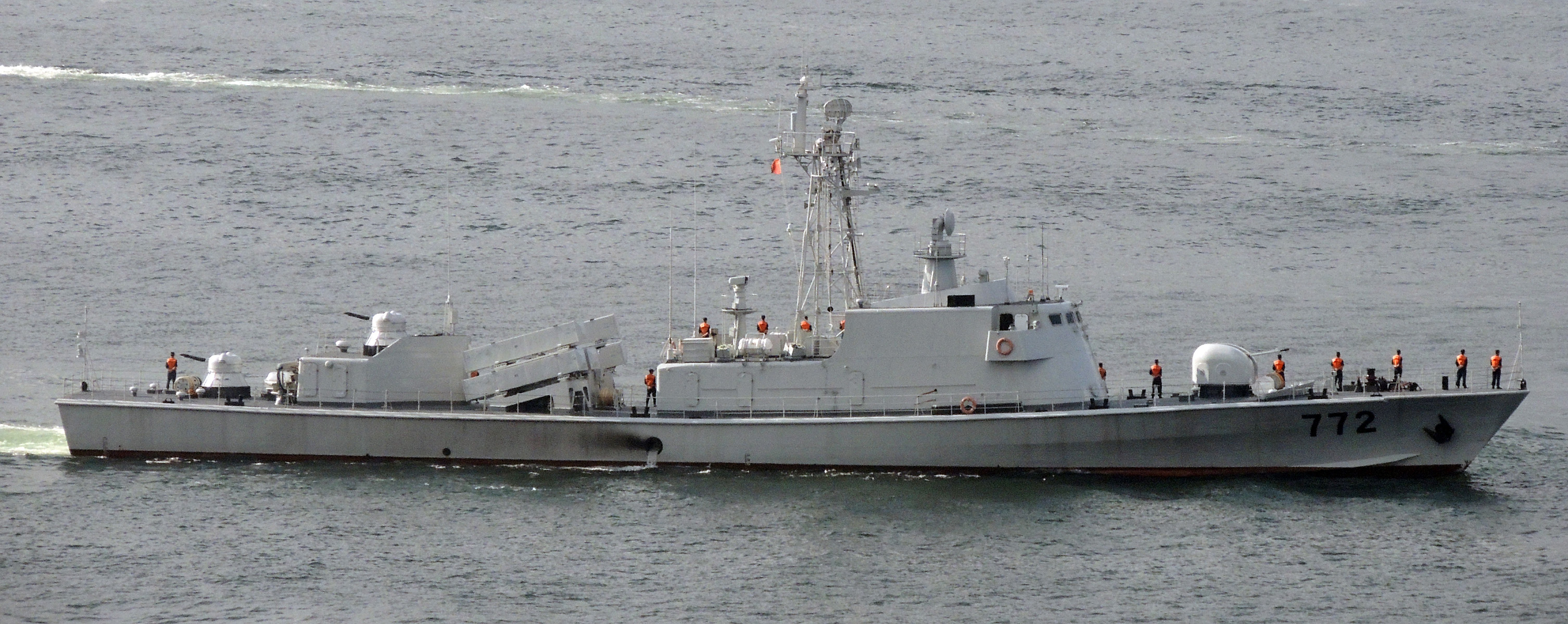 駐港部隊艦艇大隊037II型-772導彈艦